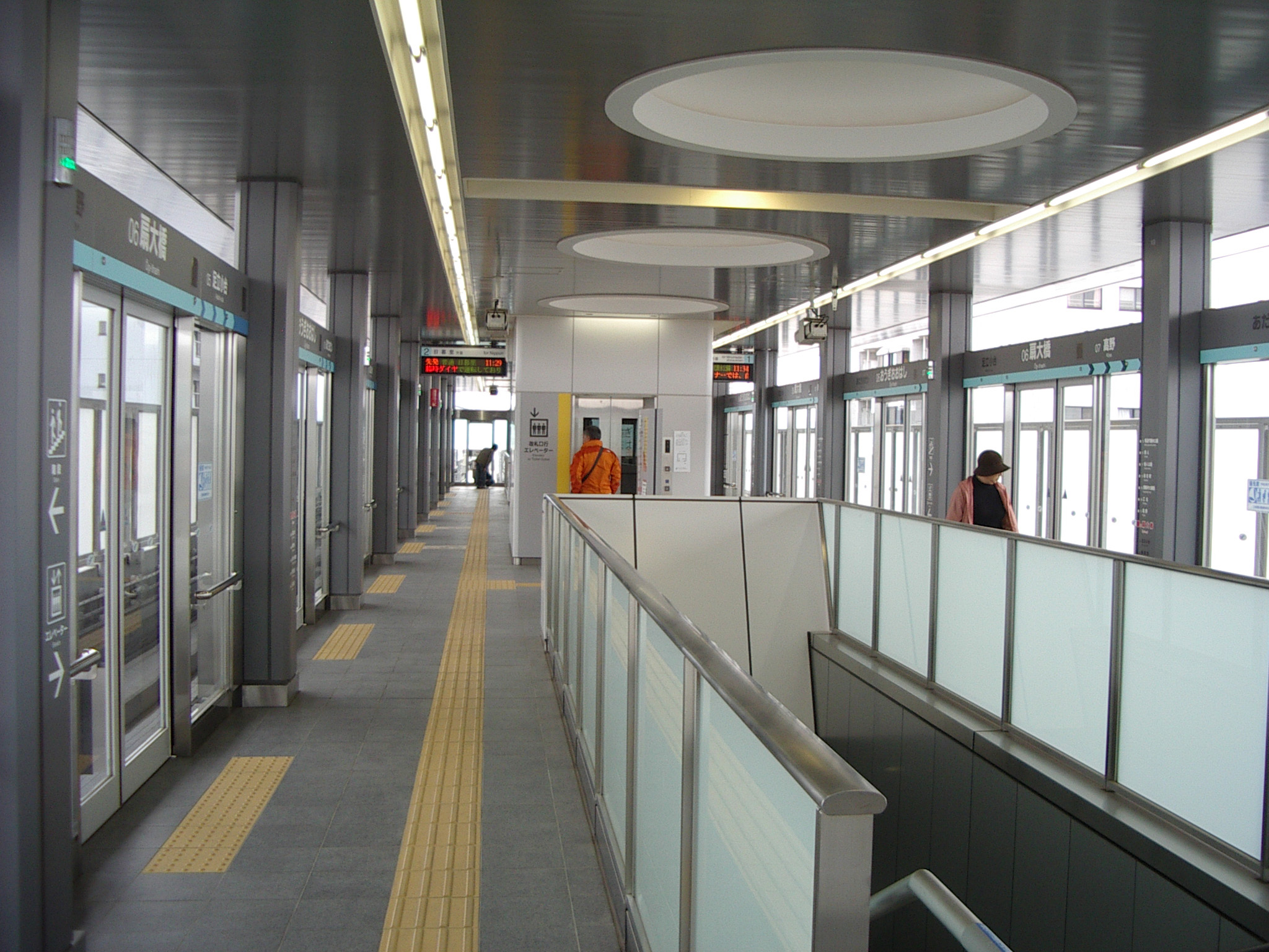 日暮里・舎人ライナー扇大橋駅